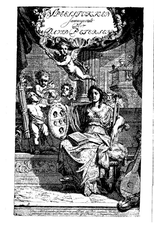 David Petersen, Frontisptiz Speelstukken